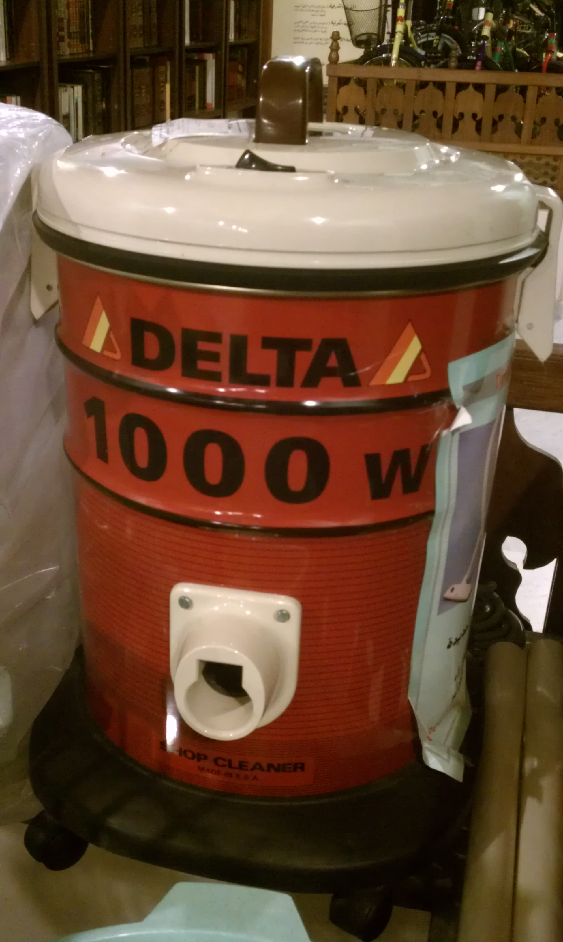 A vacuum cleaner in Jeddah, Saudi Arabia